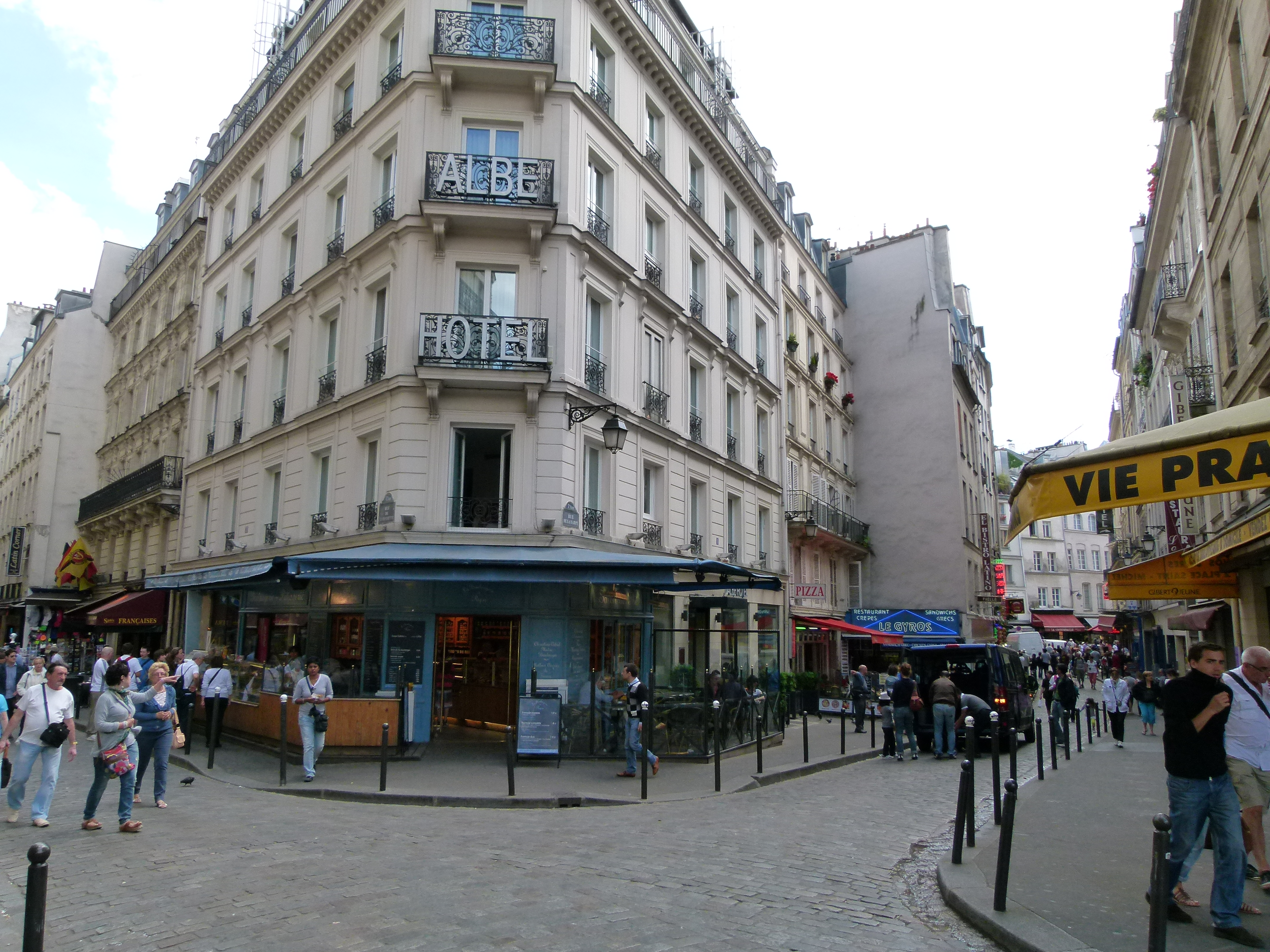 Quartier Latin près de Saint-Michel